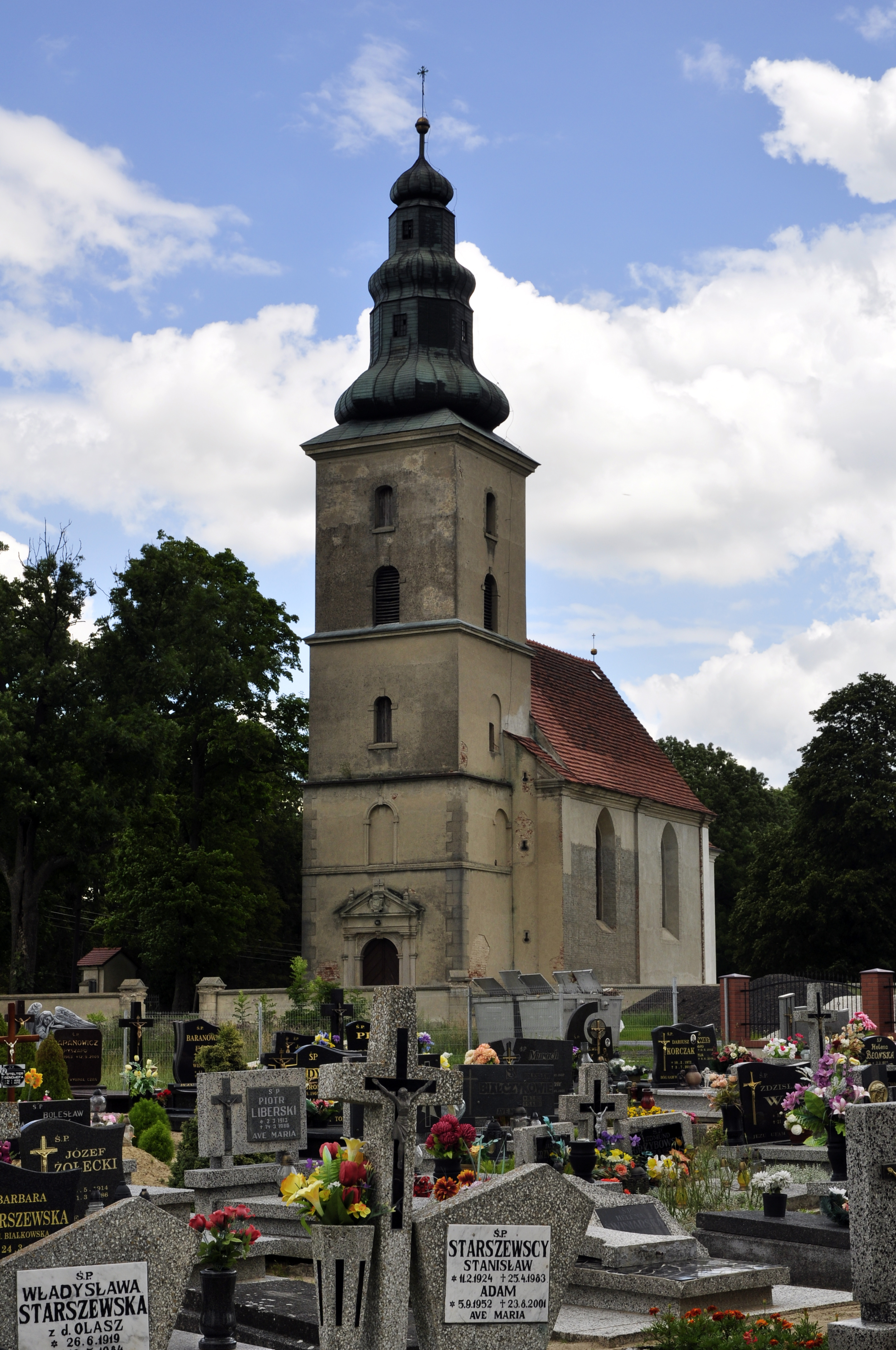 Runowo, kościół par. p.w. Świętej Trójcy, 1606